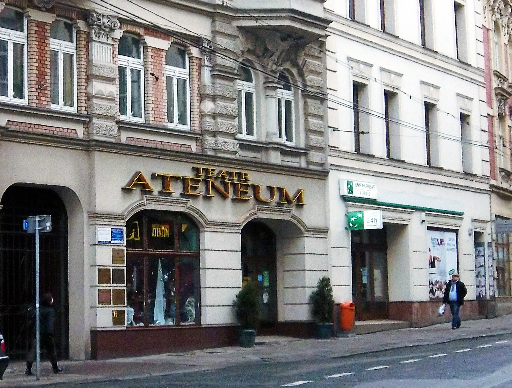 Teatr Ateneum - ulica św. Jana w Katowicach.